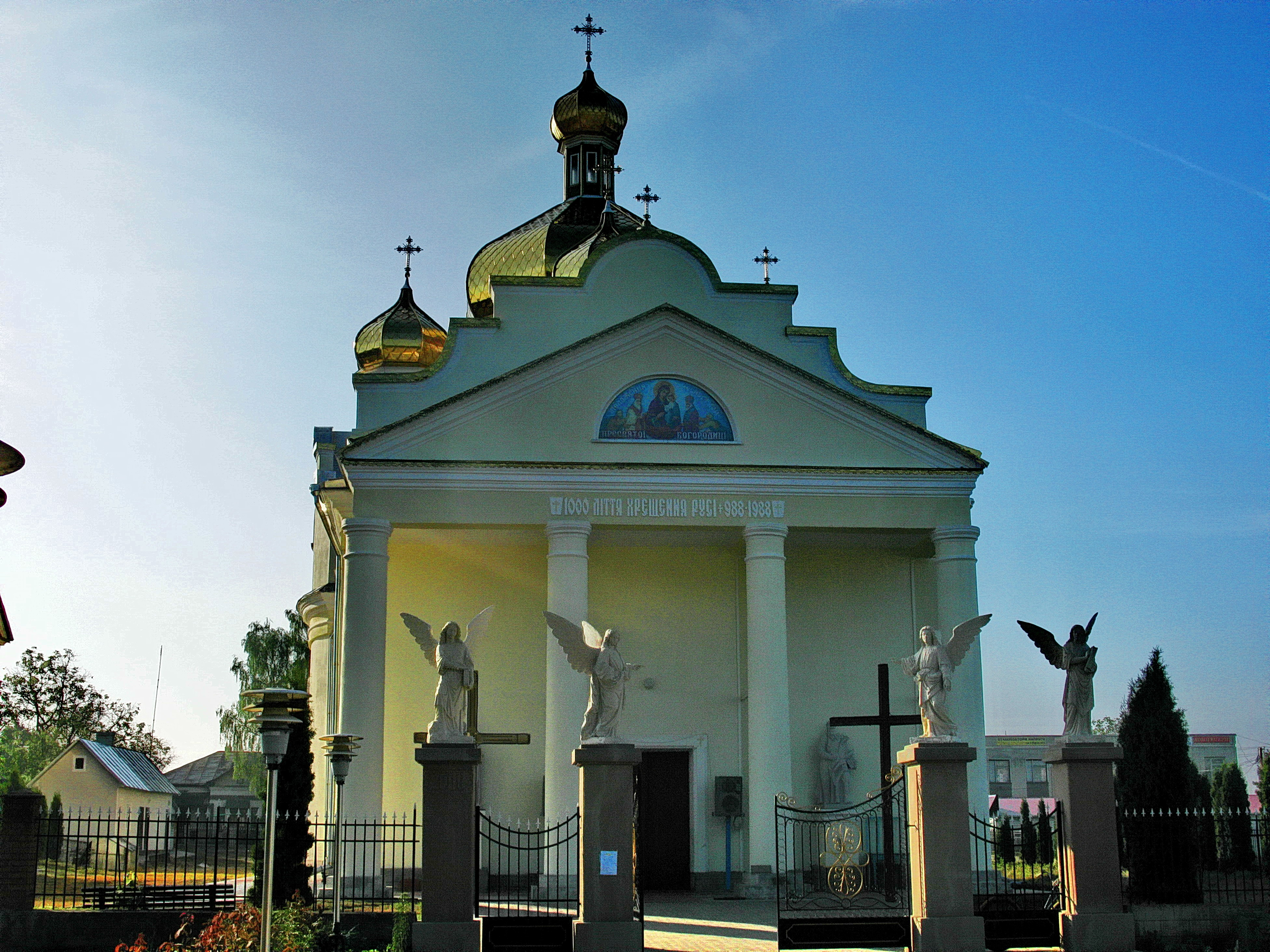 Церква Возложення Ризи(мур.), Хоростків, вул.Незалежності,76